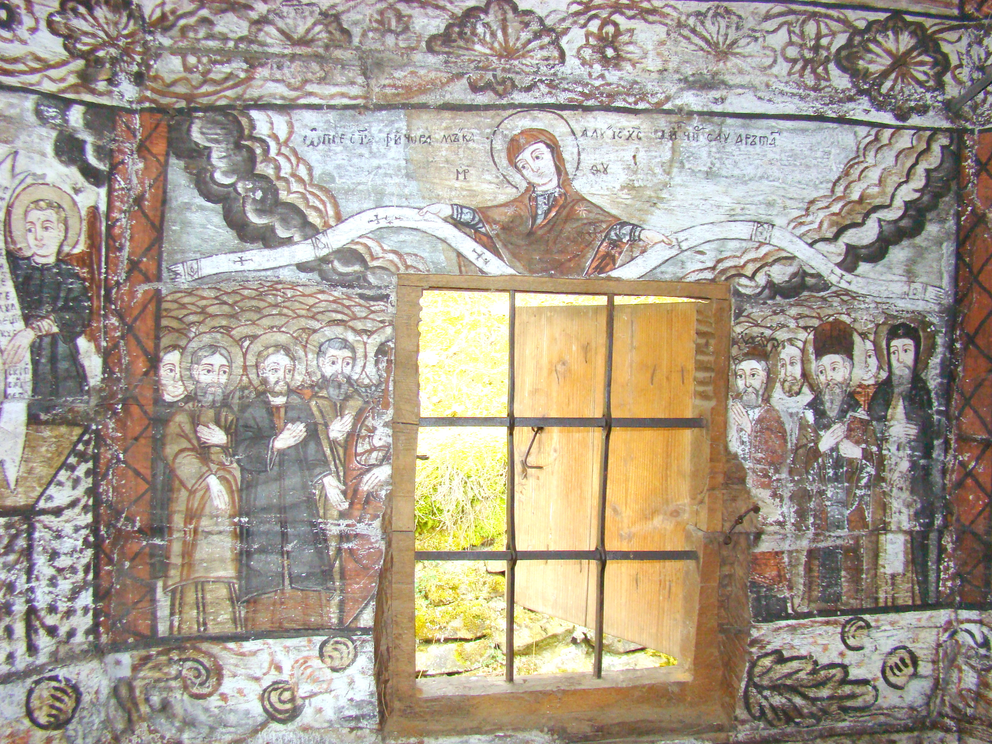 Biserica de lemn „Nașterea Maicii Domnului” din Călinești-Căeni, județul Maramureș